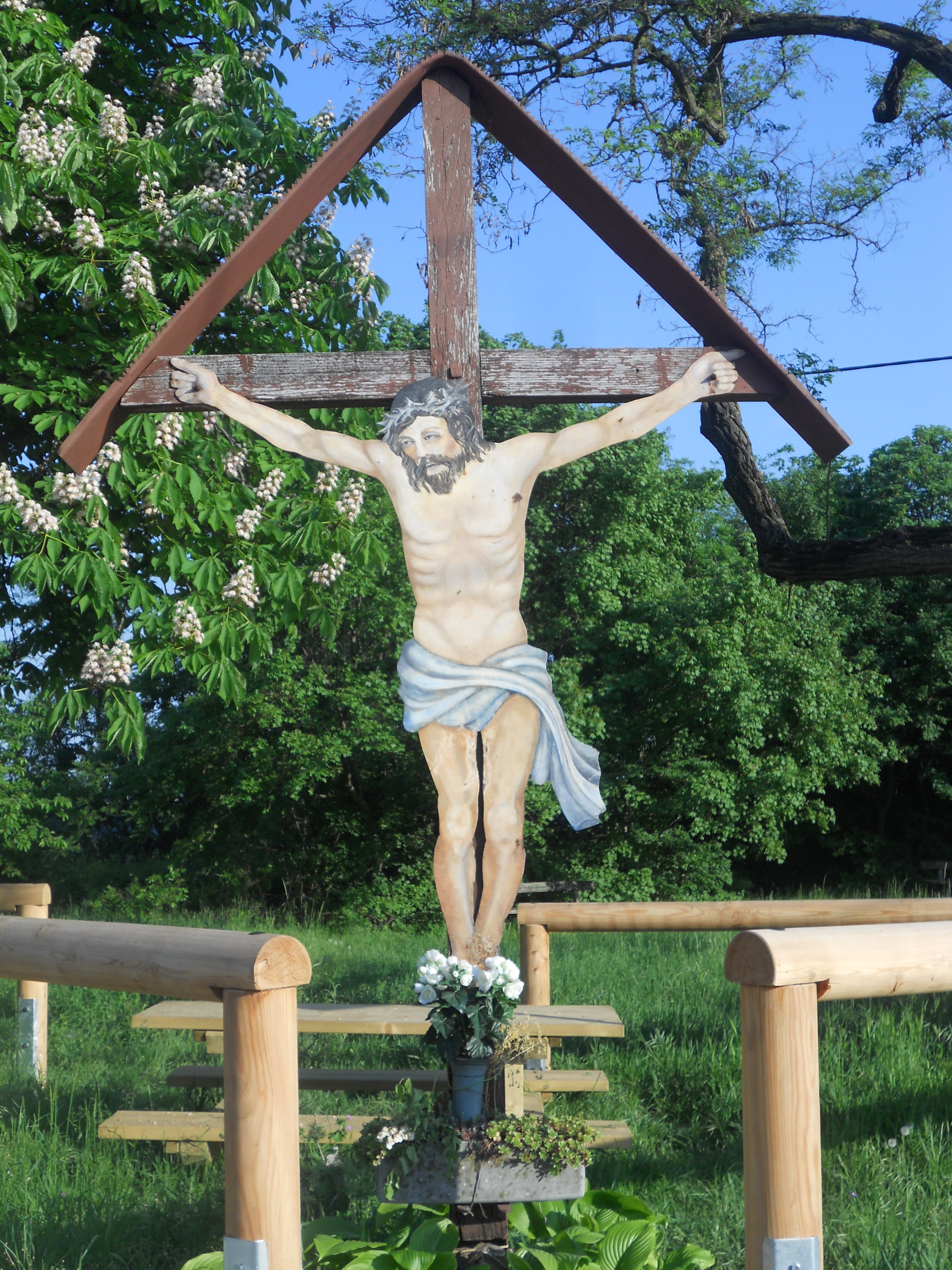 "Rotes Kreuz" Ecke Krottenhofgasse / Am Bisamberg